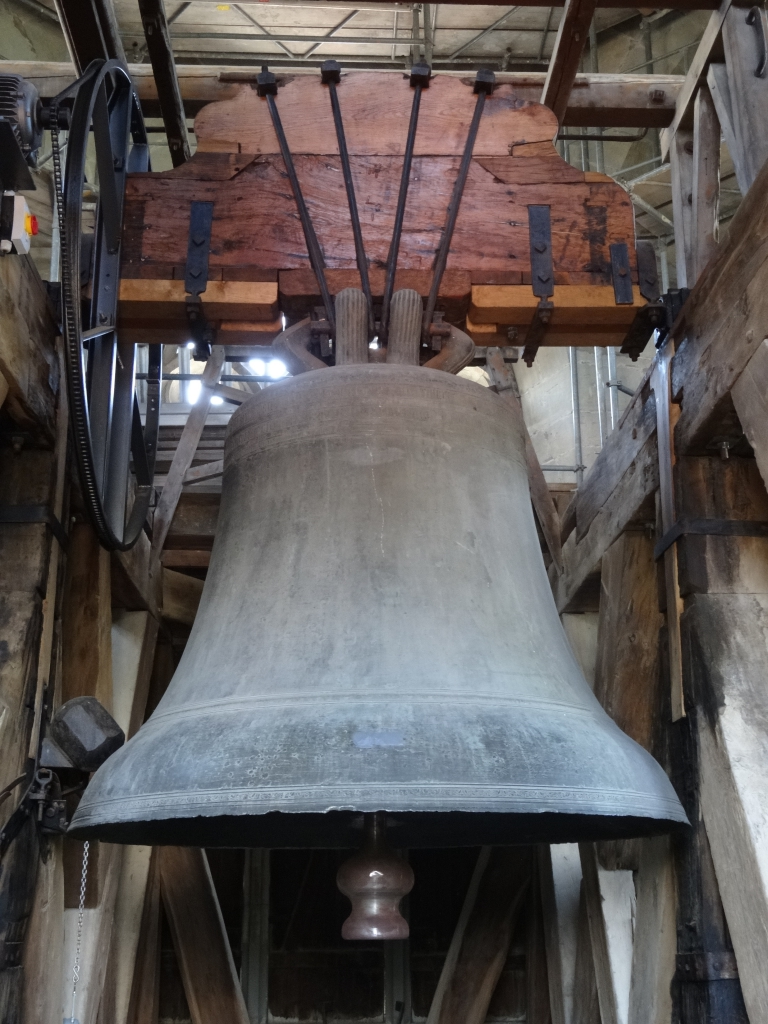 Cathédrale St-Nicolas de Fribourg (Suisse). Cloche de Sion dans la première chambre des cloches.